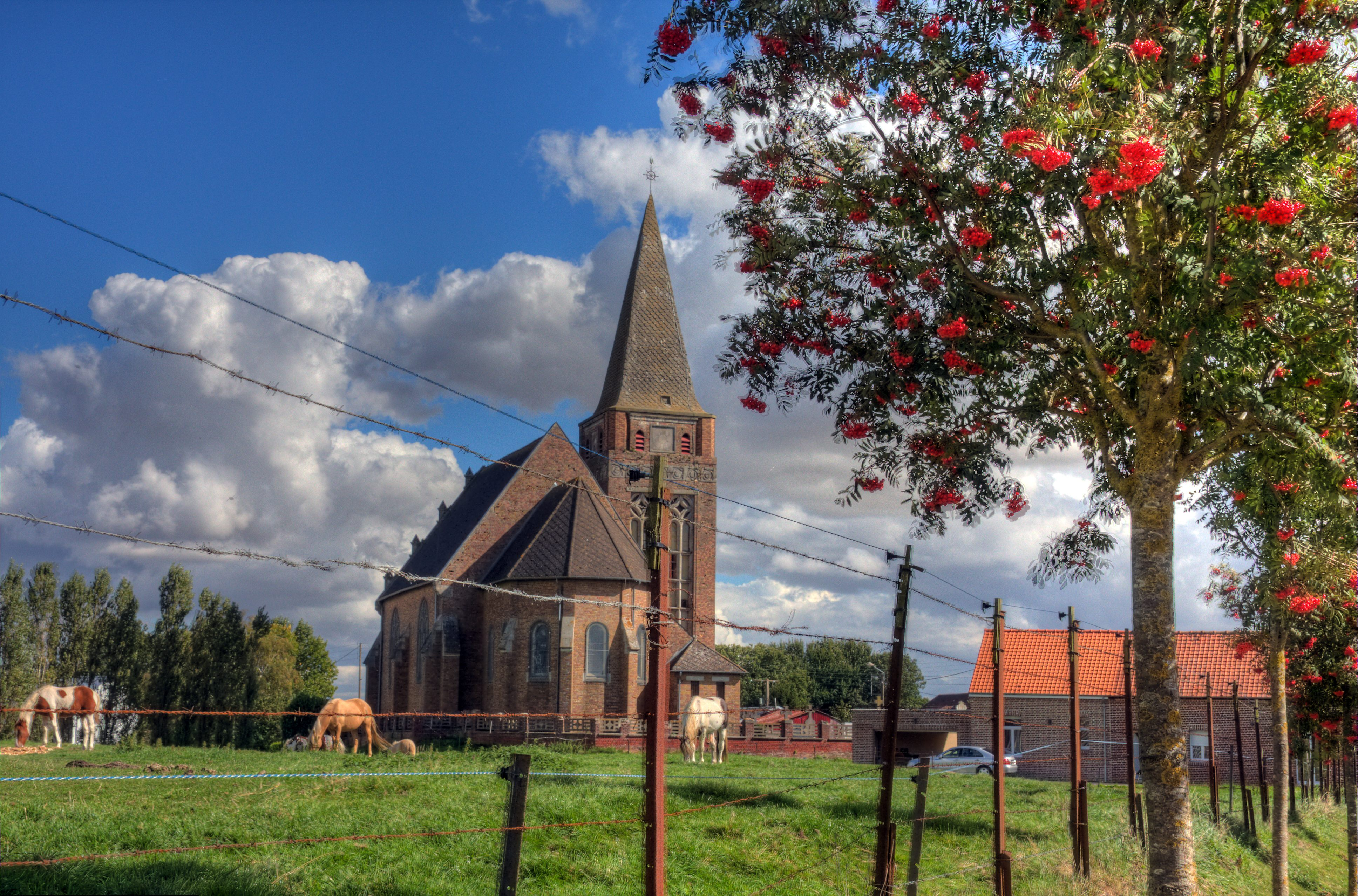 L'église de Bus